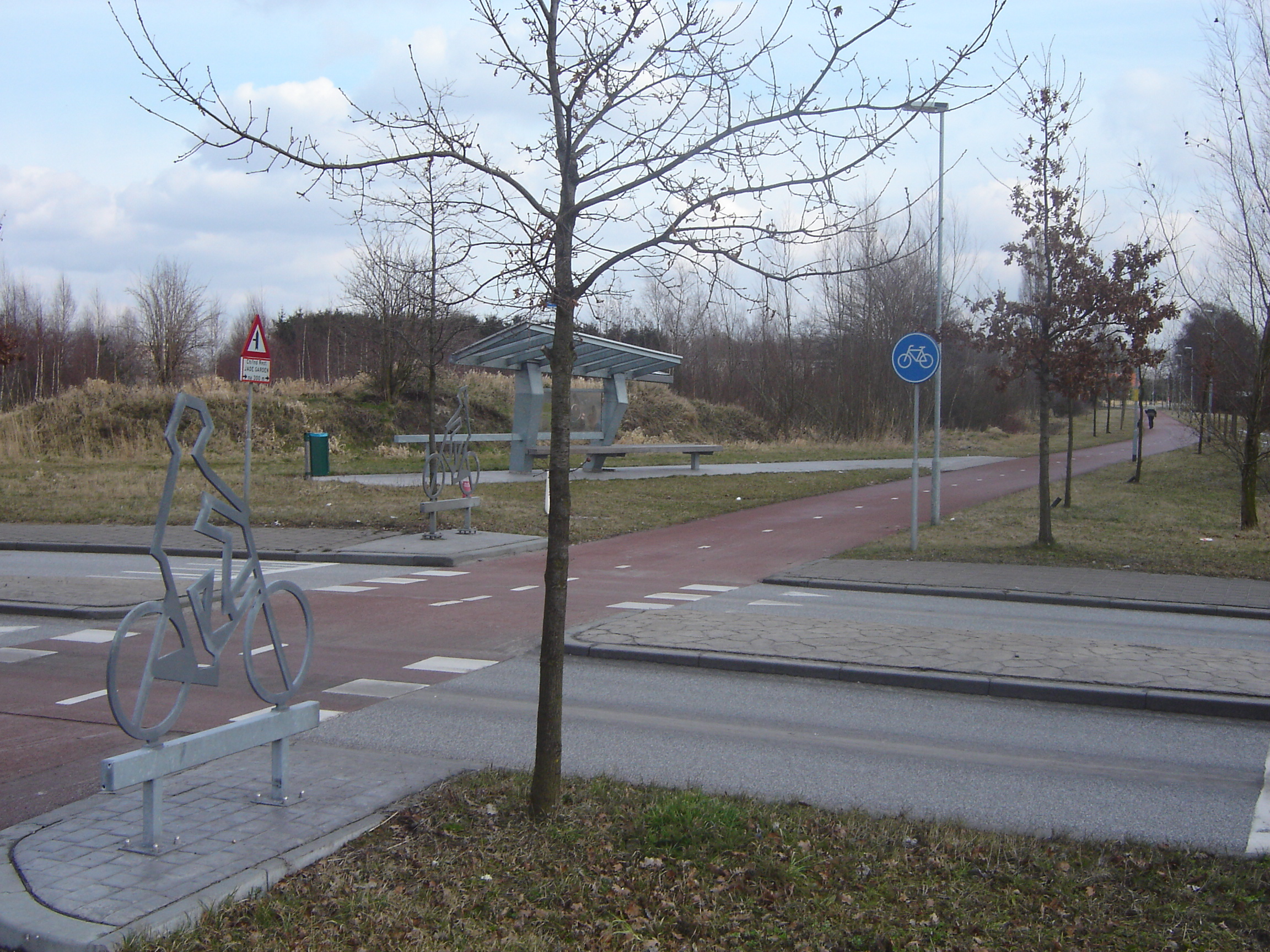 Voorbeeldfietsroute Breda Etten Leur nabij woonboulevard Breda